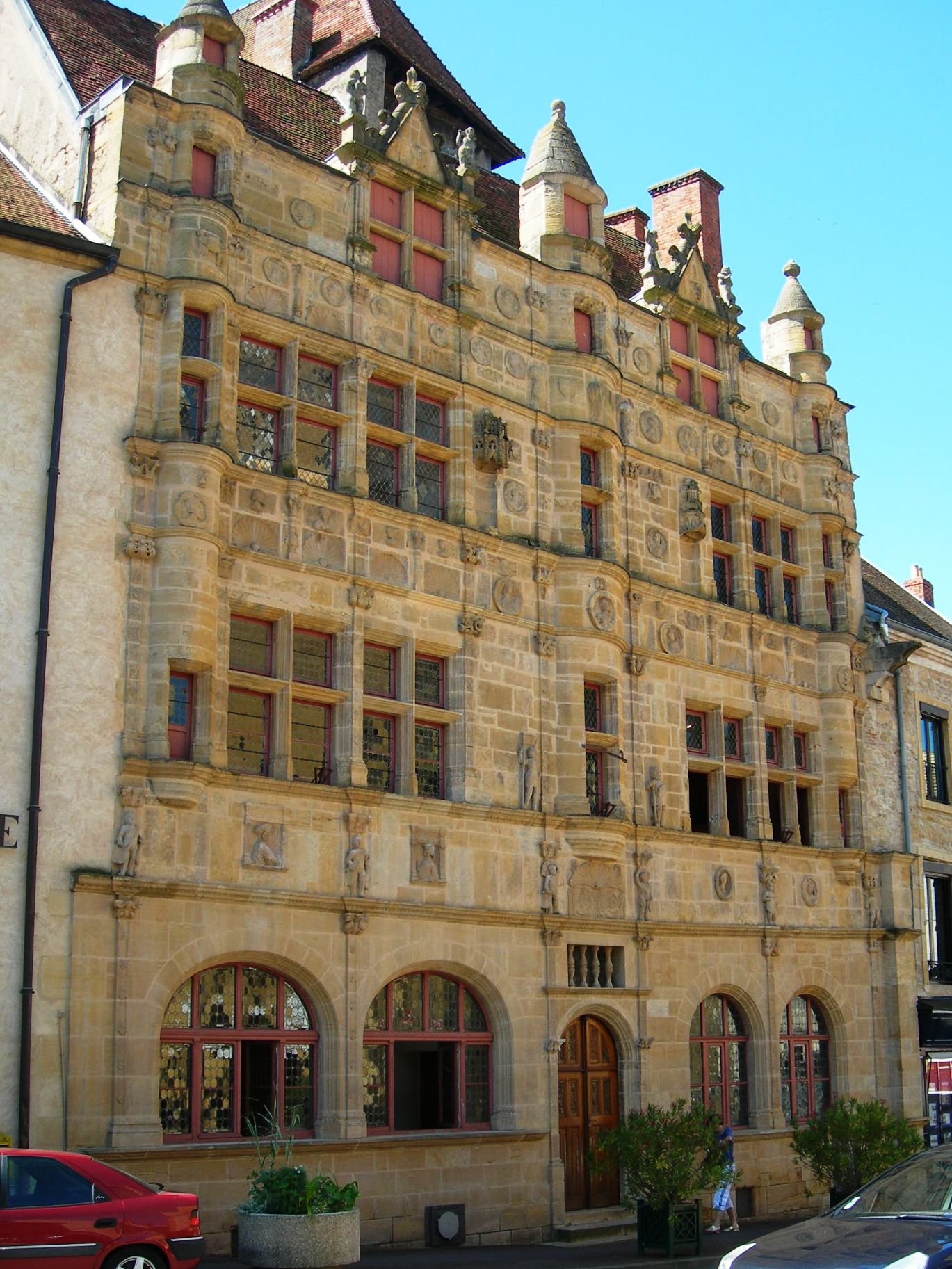 Paray-le-Monial, Hotel de ville)